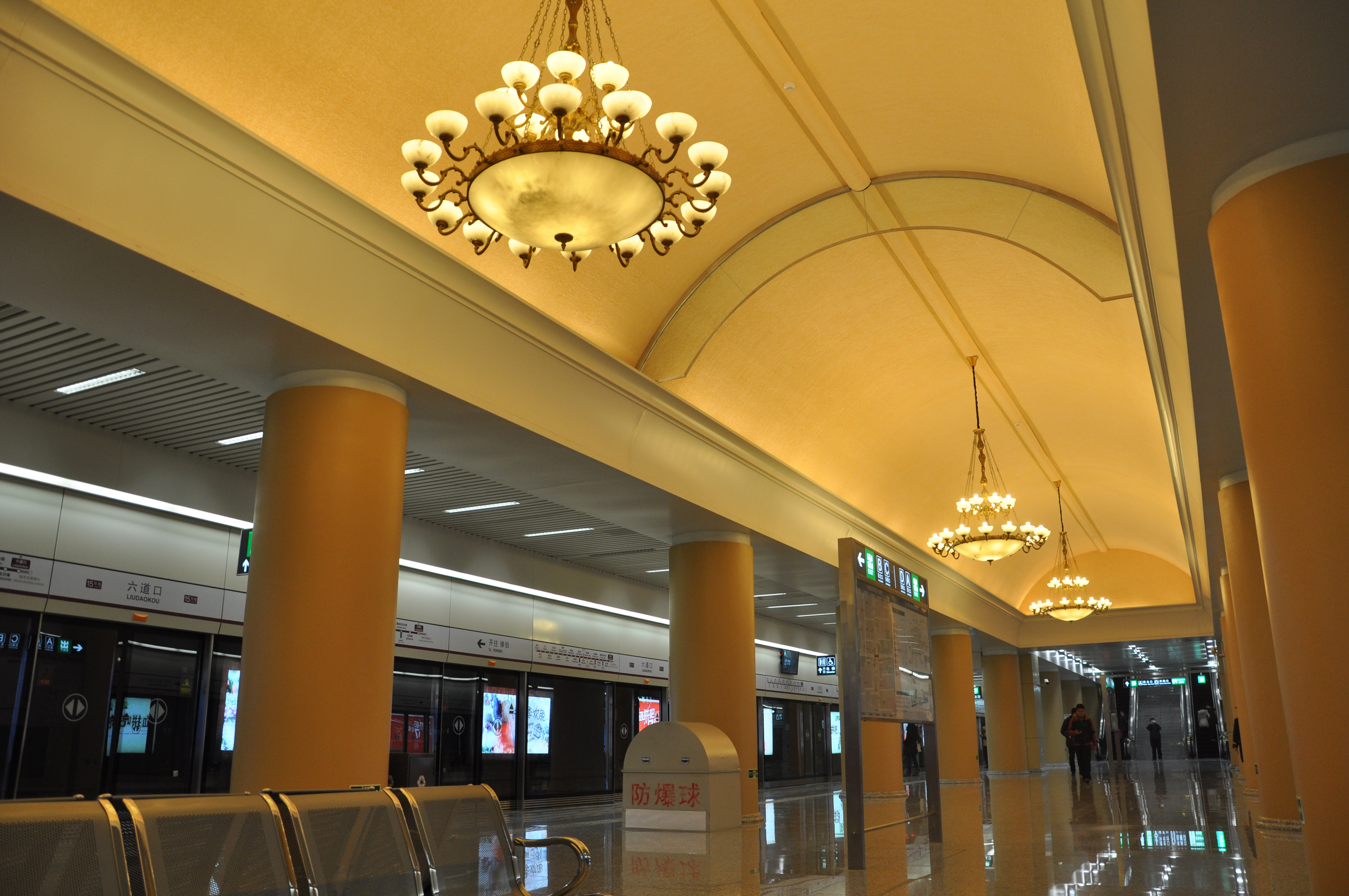 北京地铁15号线六道口站站台